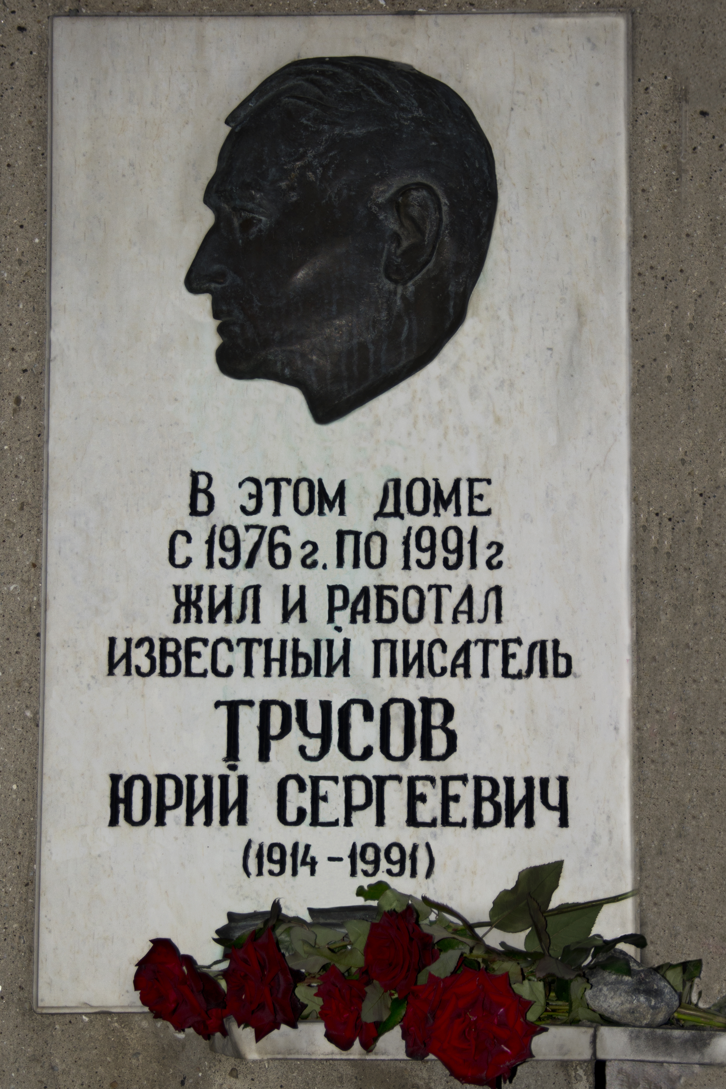 Мемориальная доска Юрию Трусову, ул. Белинского 6, г.Одесса